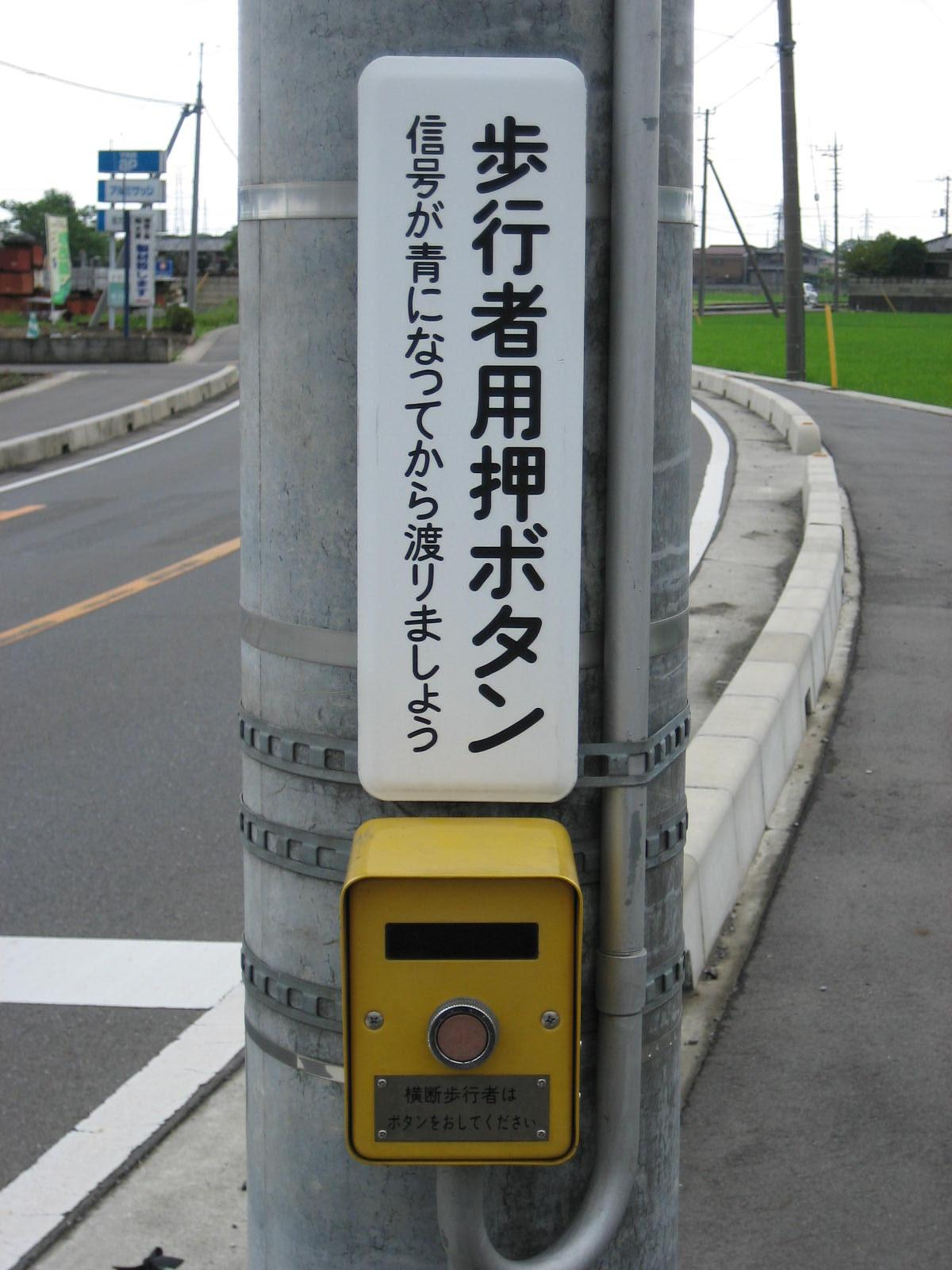 押しボタン式信号機のボタン